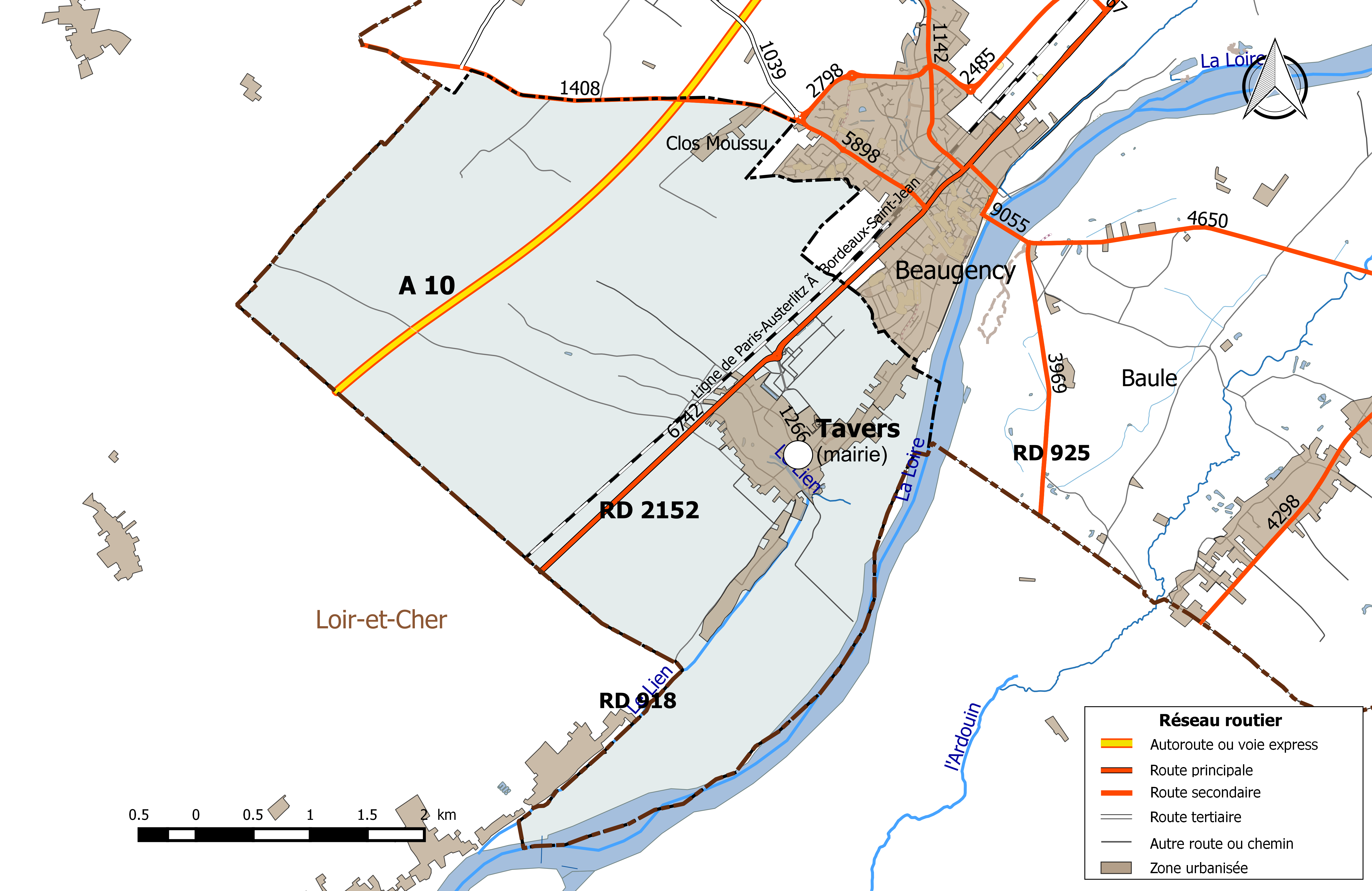 Carte du réseau routier de la commune de Tavers.